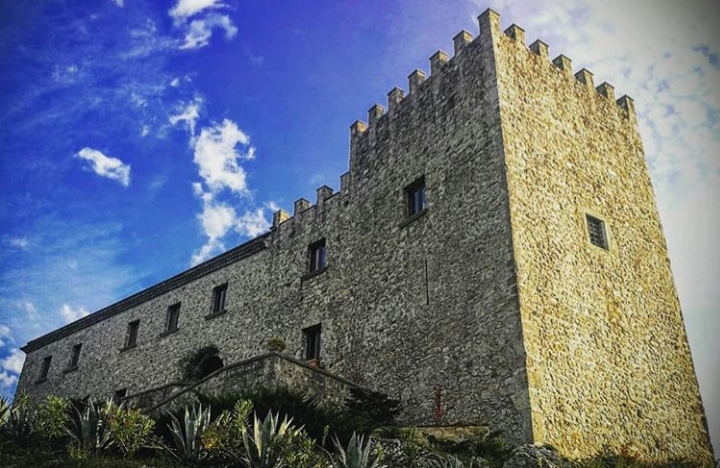 Torre Castello Viggianello